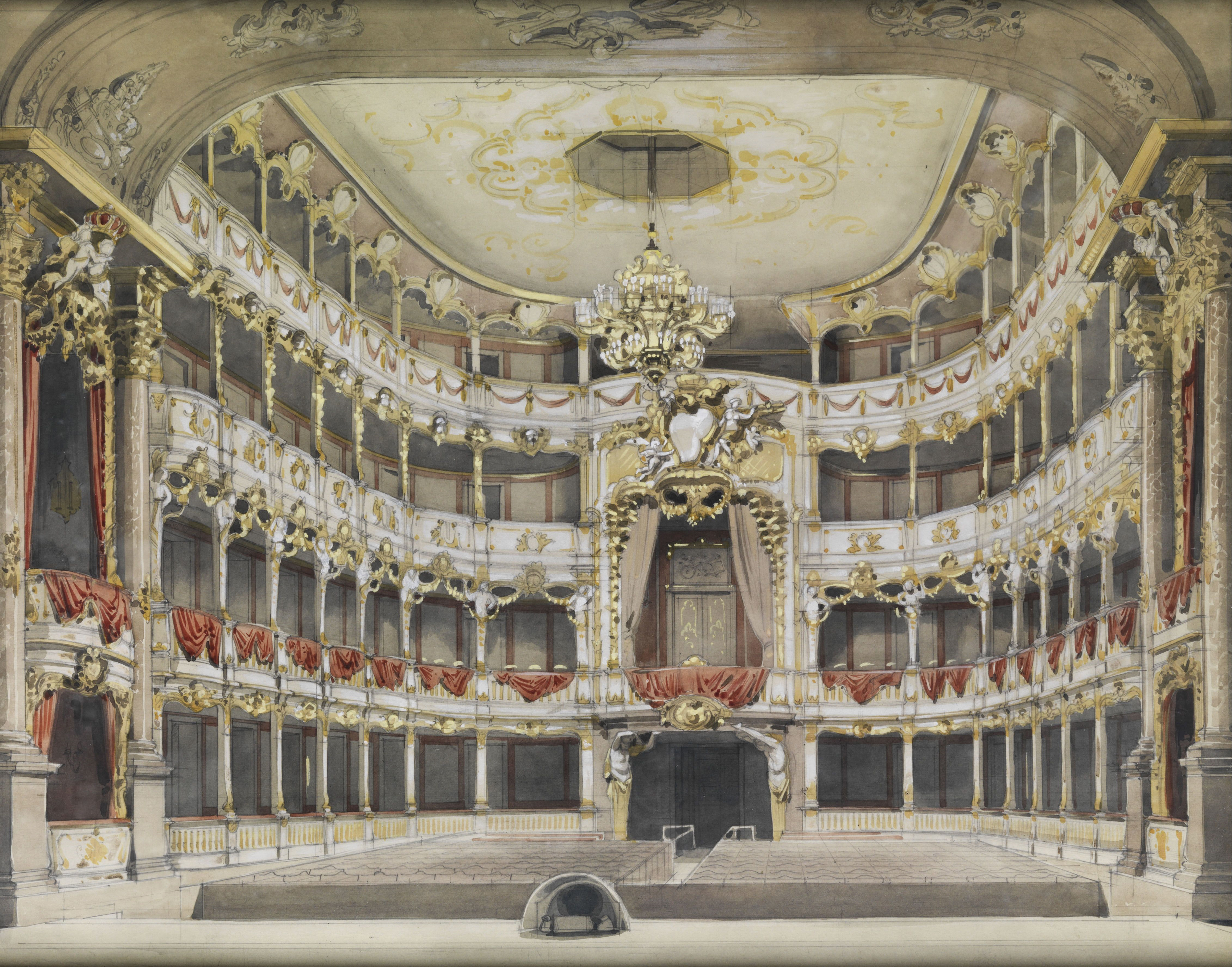 Inneres des Residenztheaters in München (Cuvilliés-Theater), evtl. Entwurf für eine Umgestaltung oder Neudekoration?, Gouache auf Karton. 43 x 54 cm.